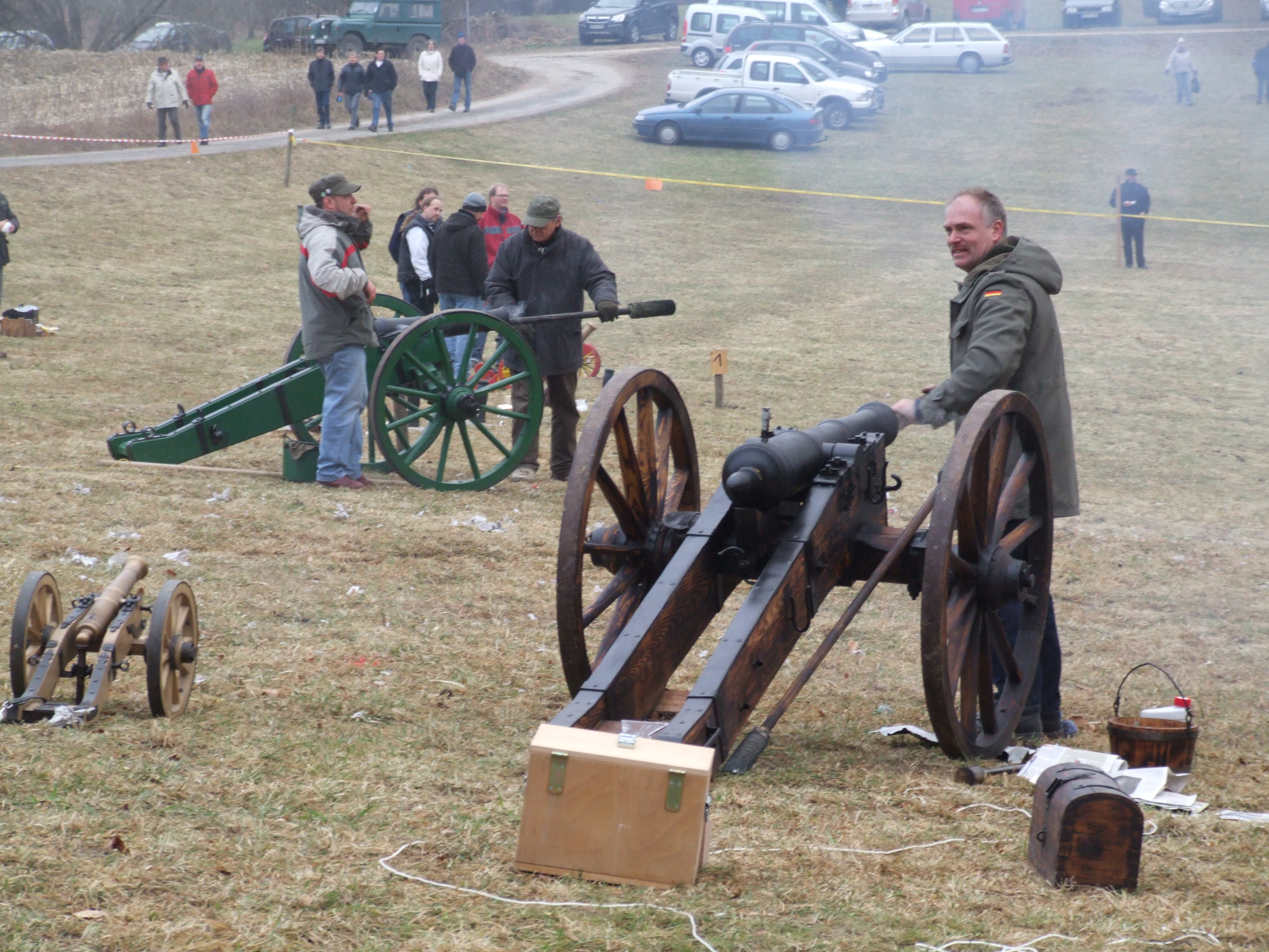 Nachladen der Böllerkanonen. Aufgenommen beim Silvesterböllern der Badischen Böllerschützen Nußdorf auf der Wiese über dem Dorf Nußdorf (Überlingen) am Bodensee, Deutschland.